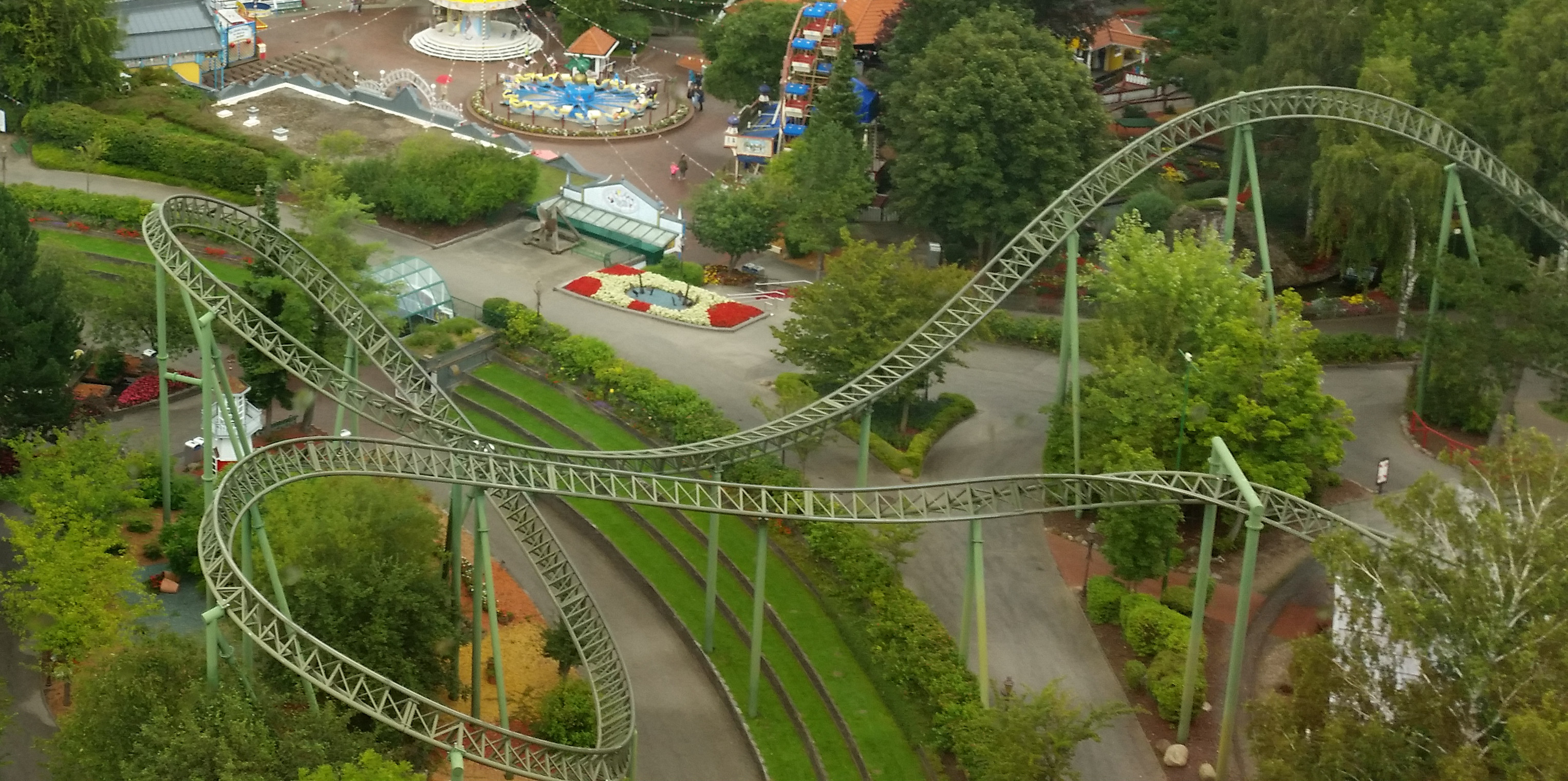 Buchtknoten in "Der Fluch von Novgorod"